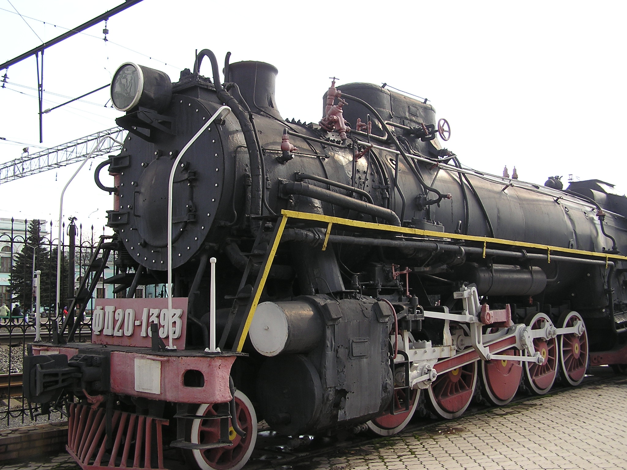 Музей истории и развития Донецкой Железной дороги. ФД20-1339